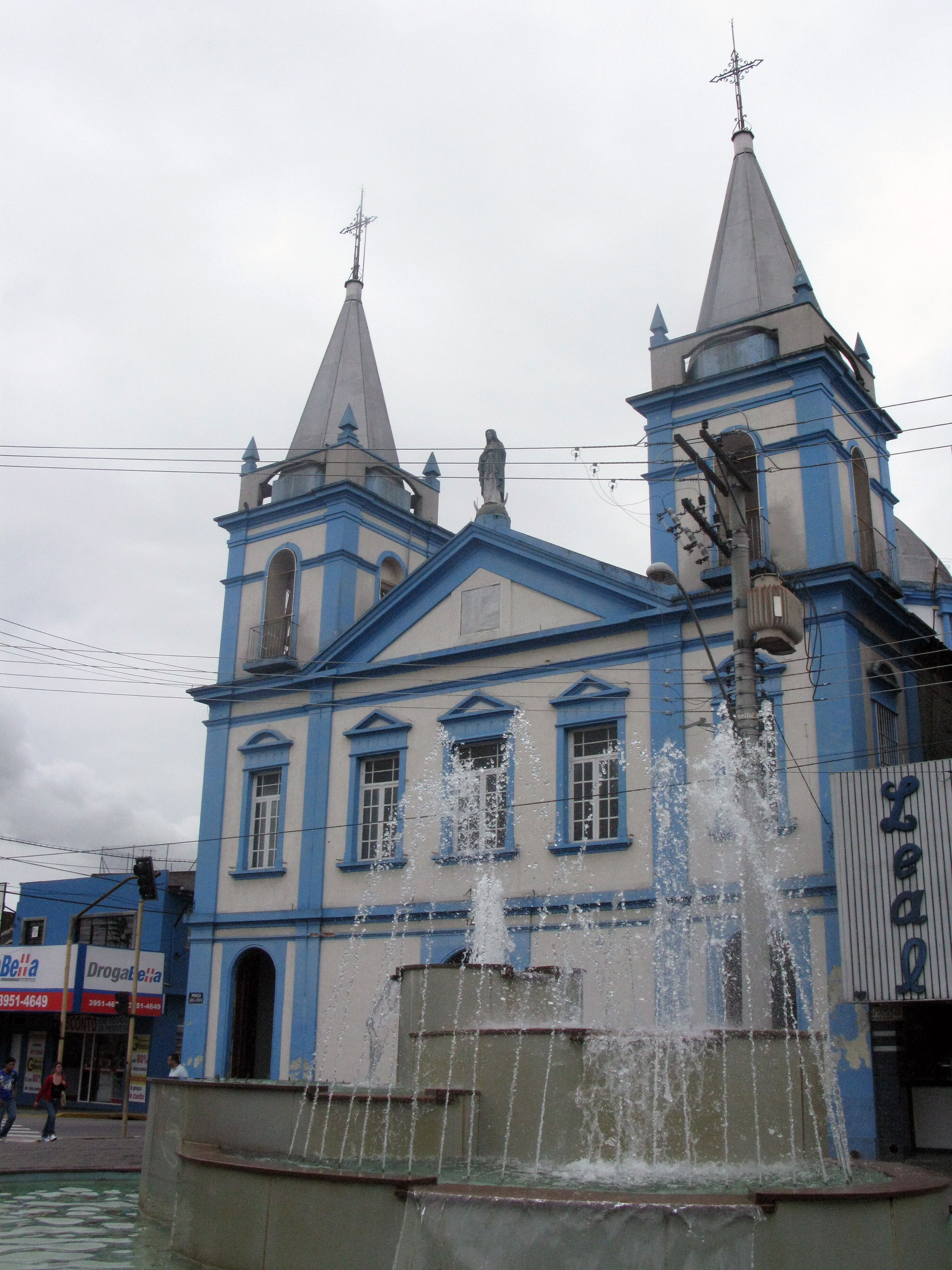 Fachada da Igreja Nossa Senhora do Bom Sucesso, em Jacareí, São Paulo, Brasil.